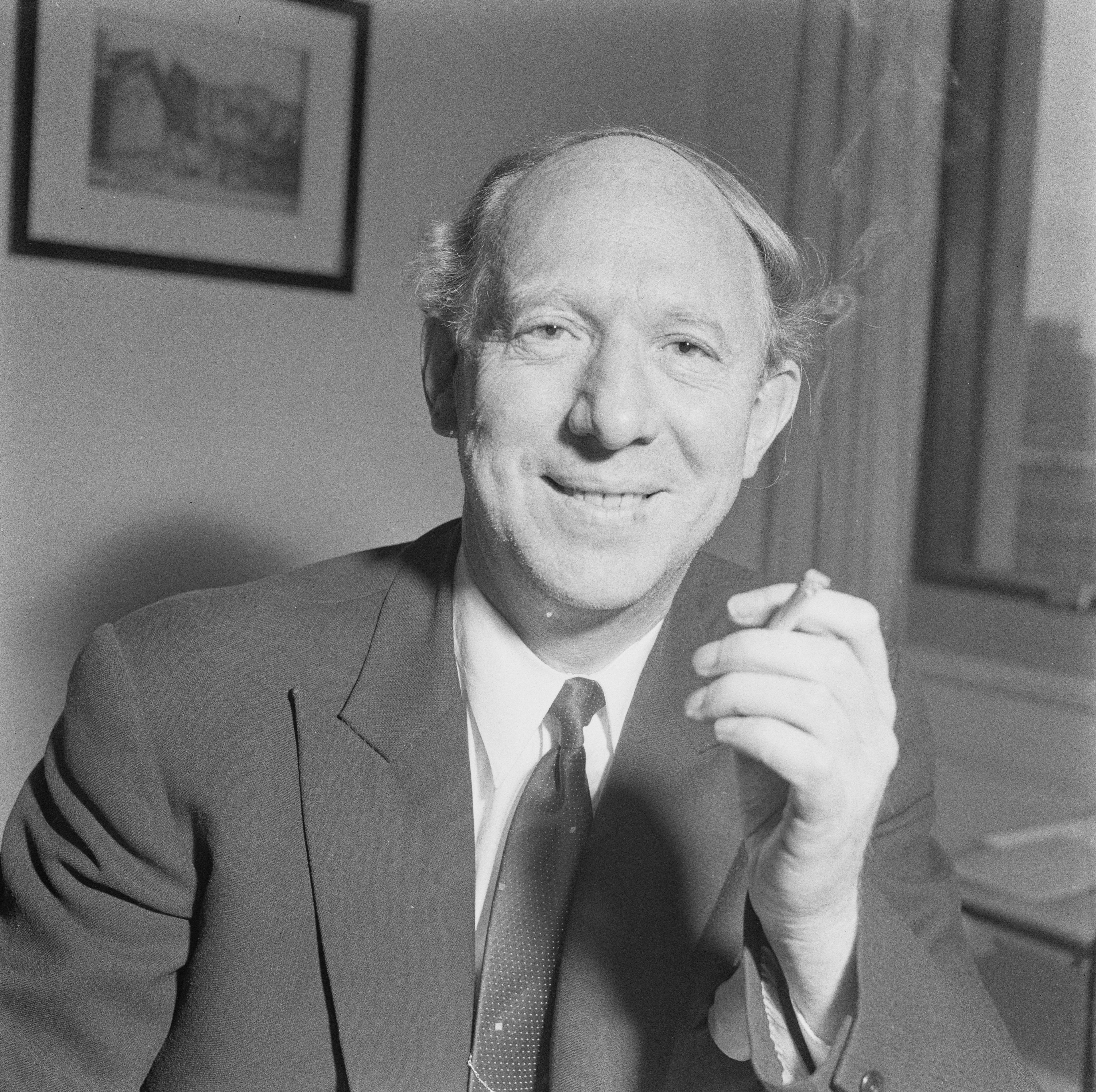 Bildet er hentet fra Arkivverket. Leif Rustad mister skjegget, Kringkastingen. Arkivinstitusjon : Riksarkivet Arkivnavn : Billedbladet NÅ Sted : Norge, Oslo, Oslo, Emneord: Norske cellister, Norske programledere, NRK Avbildet